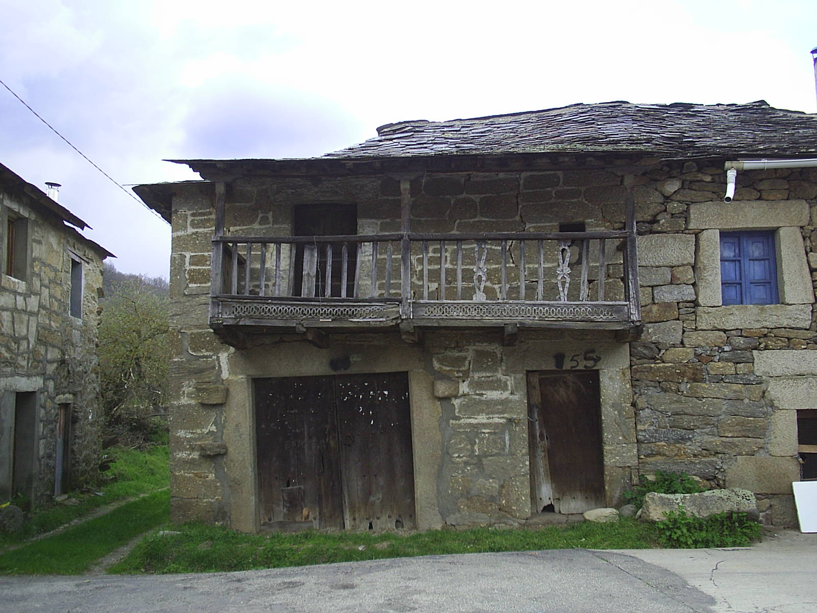 Barrio del Meillugar. Galende.